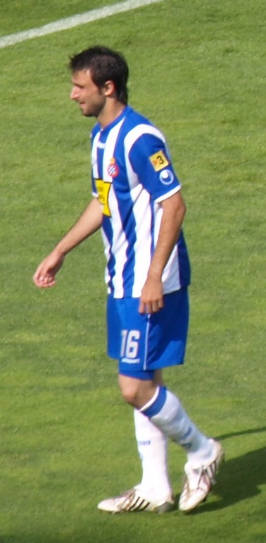 Nico Pareja en el partido que enfrentó al RCD Español y al Málaga CF en el último partido de La Liga 2008/09 en el estadio Olímpico de Montjuic.